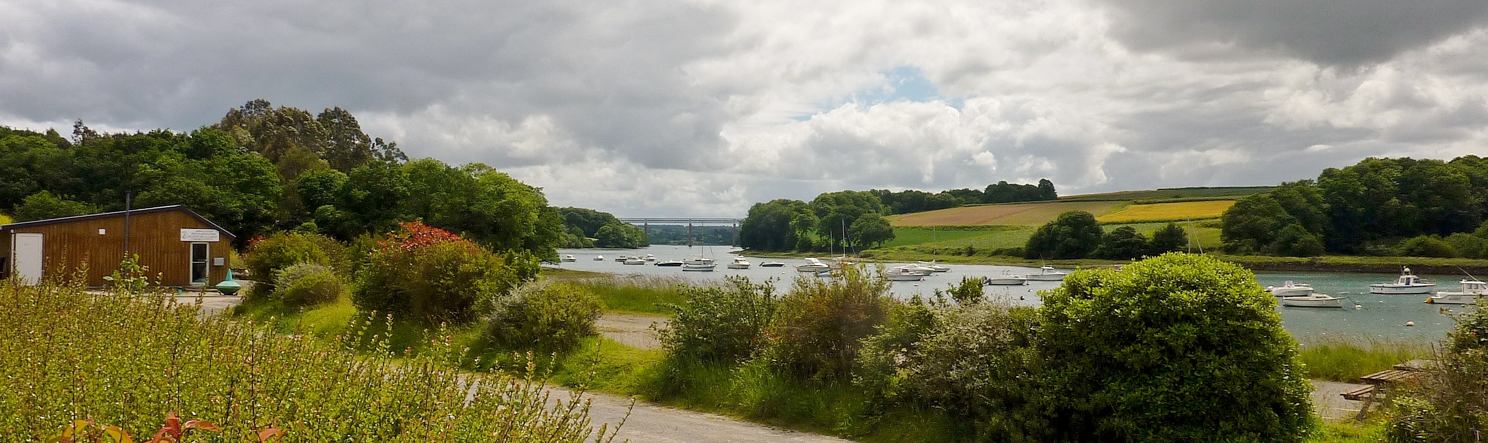 Henvic : la Penzé vue vers l'amont depuis les environs de la chapelle Sainte-Marguerite ; à l'arrière-plan le viaduc ferroviaire de la Penzé (ligne Morlaix-Roscoff).